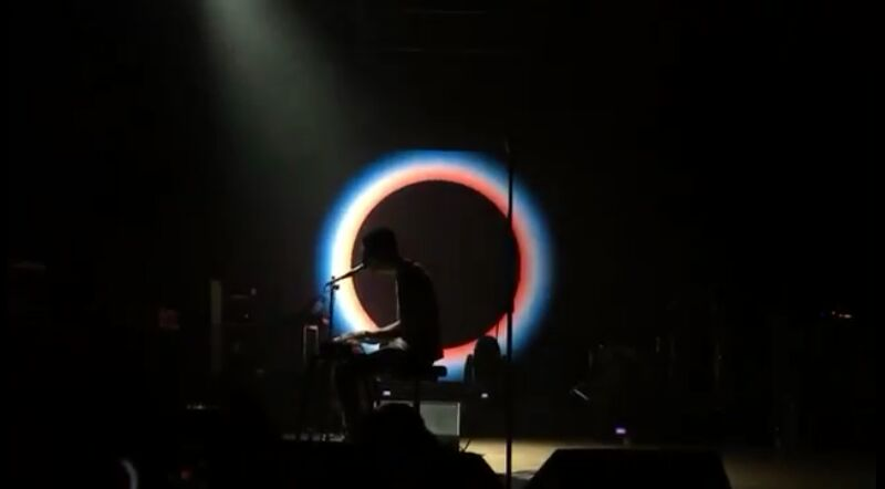 I Cani live all'Alcatraz 2016